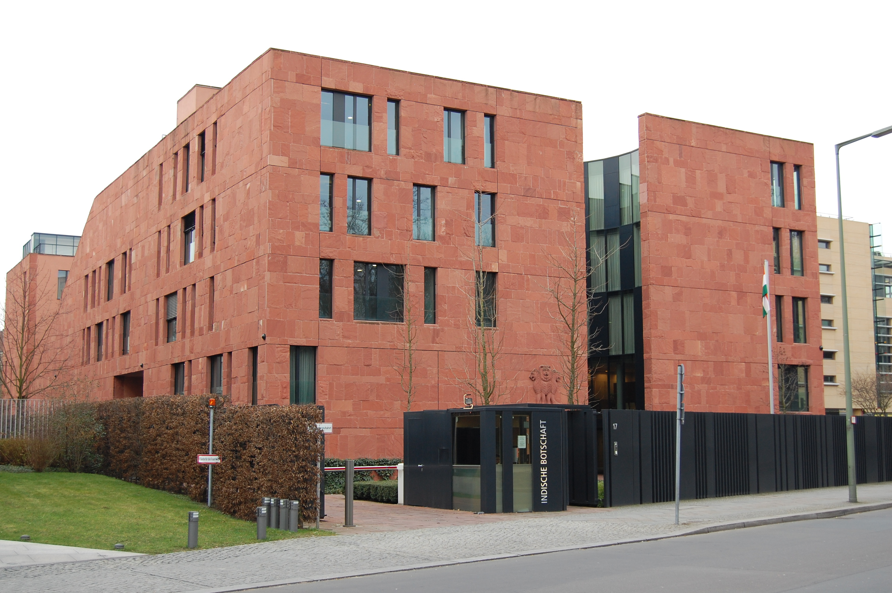 Indian Embassy in Berlin